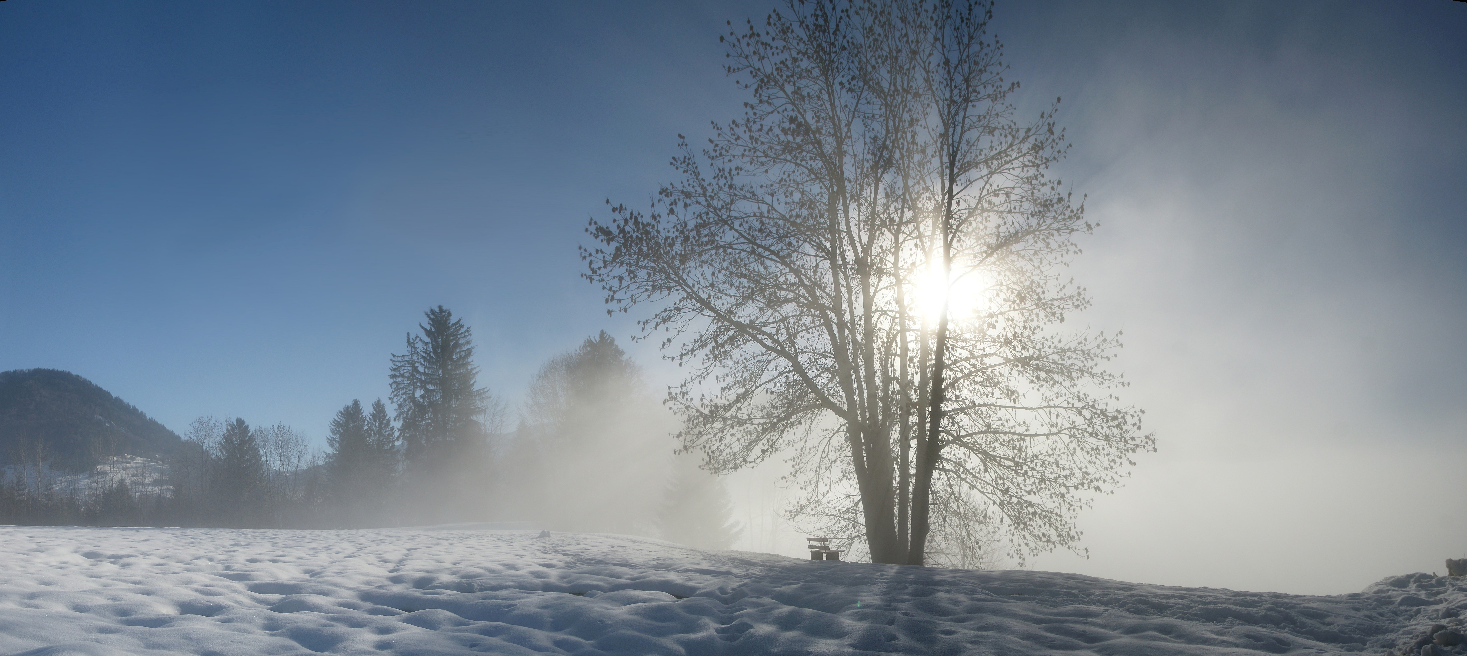 Panorama aus 6 Bilder am Sonnenrain in Hittisau, Vorarlberg.